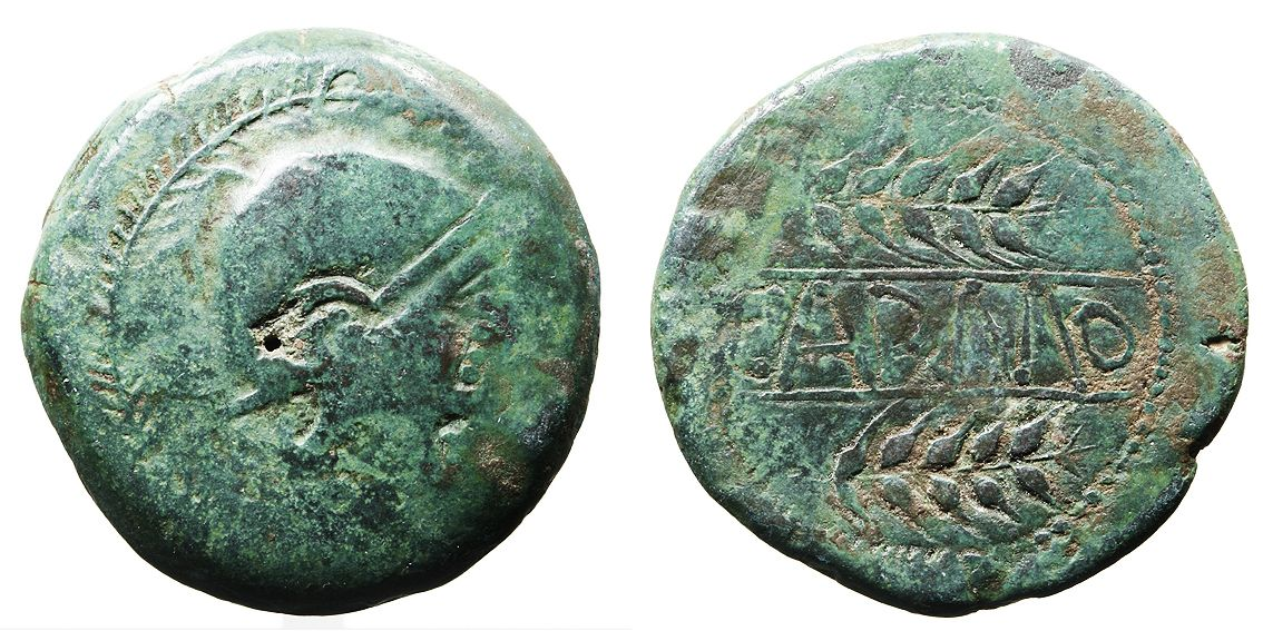 As de bronce acuñado en Carmo, la actual Carmona (provincia de Sevilla, España). En el reverso muestra la inscripción "CARMO" entre espigas, rodeadas a su vez por una gráfila de puntos.